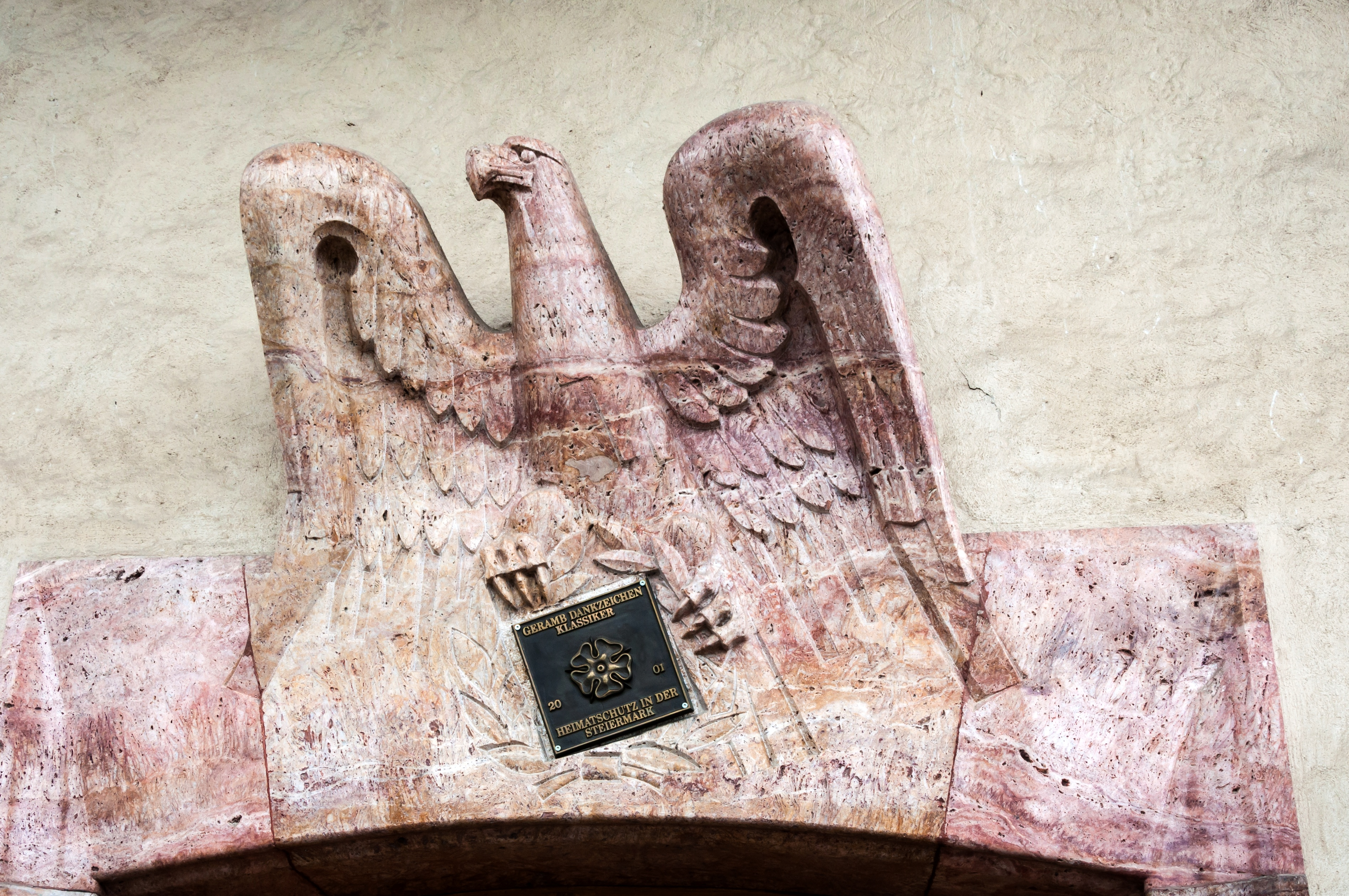 Sendeanlage Dobl (ehem. Sender Alpen)